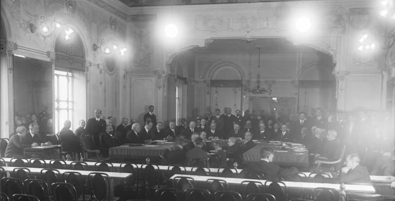 Erste Aufnahmen von der Völkerbundskonferenz in Lugano/Schweiz - unseres nach dort entsandten Sonder-Bild-Berichterstatters! Blick in den Sitzungssaal im Kurhaus in Lugano während der ersten Völkerbundssitzung. v.re.n.li.sitzend: der japanische Deligierte Adatci, der englische Aussenminsiter Sir Austen Chamberlain, der Generalsekretär des Völkerbundes Sir Eric Drummond, der französische Aussenminister Aristide Briand, der italienische Delegierte [Vittorio] Scialoja, der deutsche Reichsaussenminister Dr. [Gustav] Stresemann, der chilenische Delegierte Villegas, der rumänische Aussenminster Titulesco.